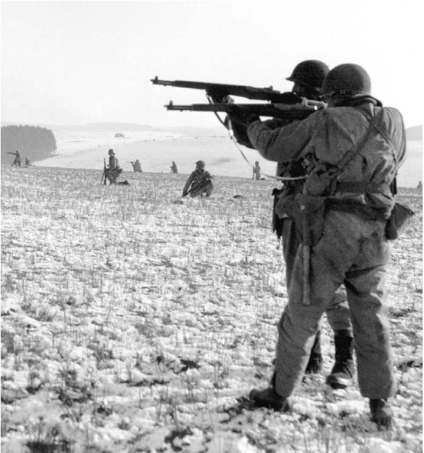 Soldats de l'infanterie américaine près de Bastogne pendant l'offensive allemande des Ardennes fin 1944-début 1945